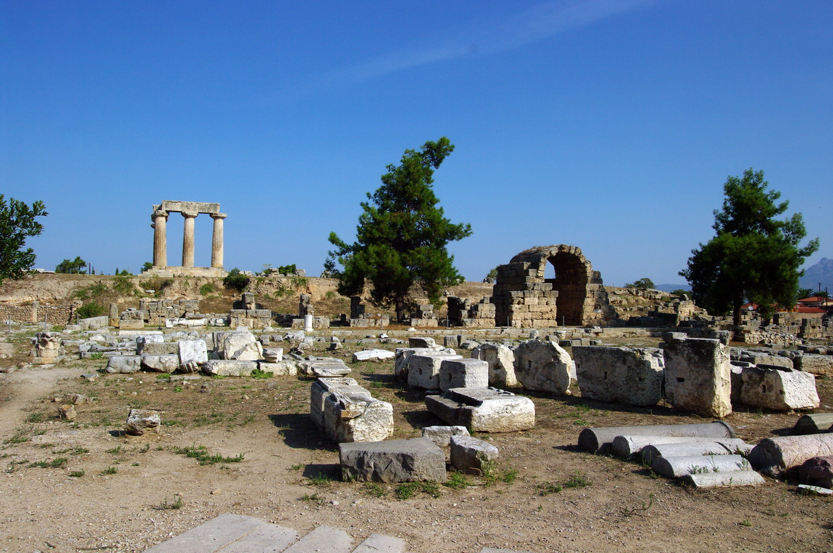 Apollo-Tempel und Propyläen, Korinth